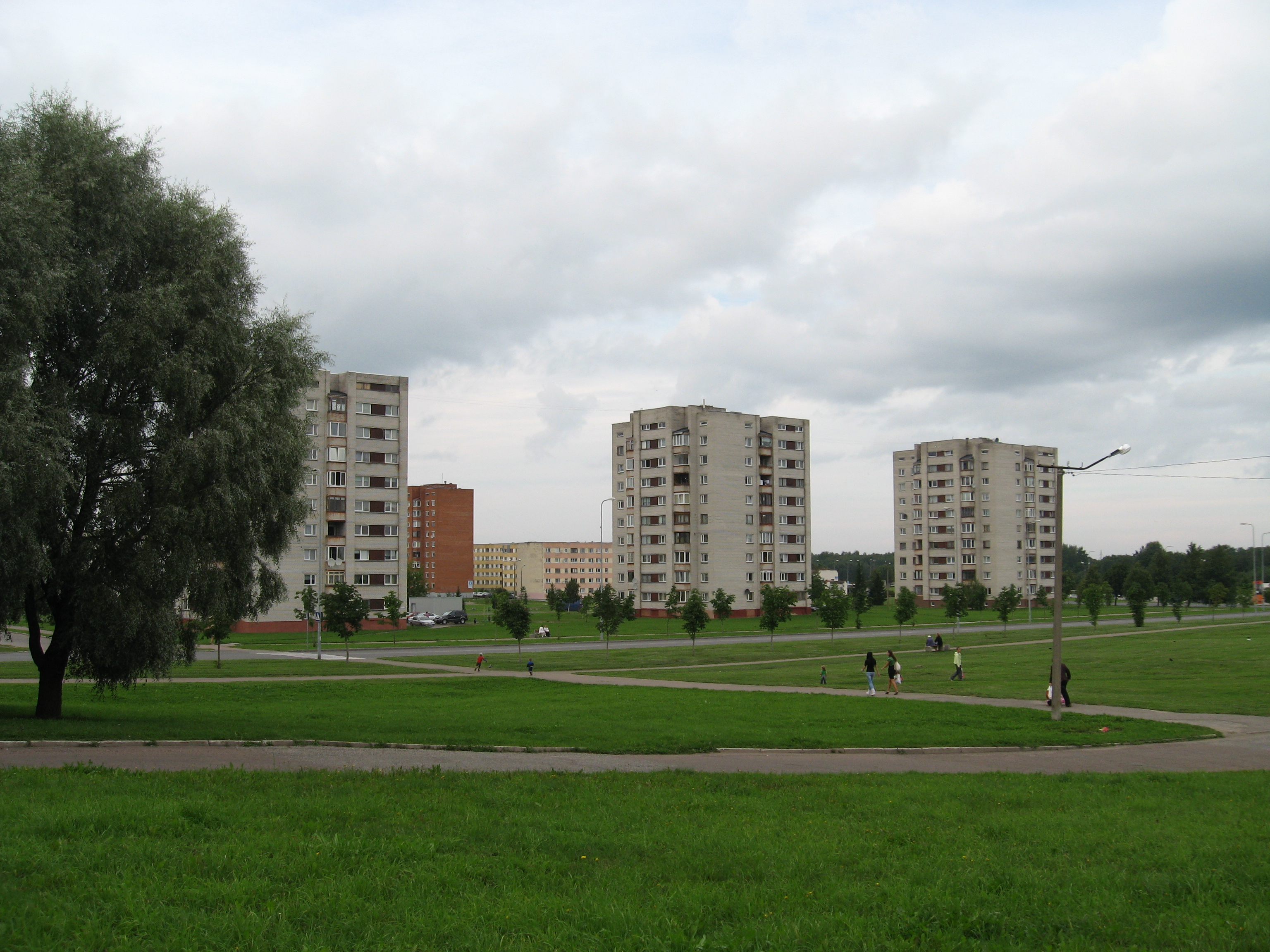 Микрорайон Таммику, снятый со стороны Ийдла, часть Ахтме